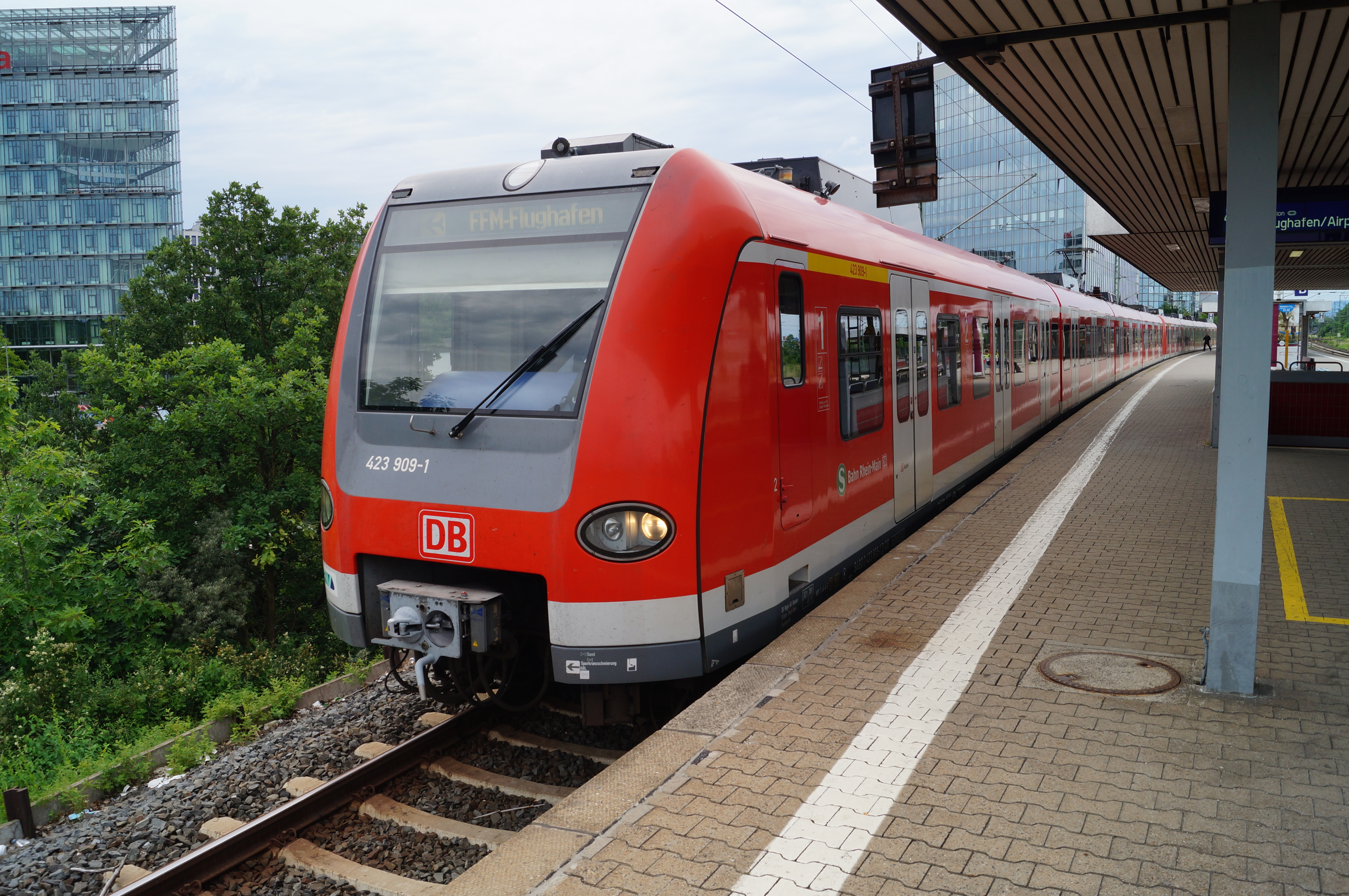 S-Bahn der S-Bahn Rhein-Main mit Triebwagen der DBAG-Baureihe 423 im Bahnhof Frankfurt-Niederrad